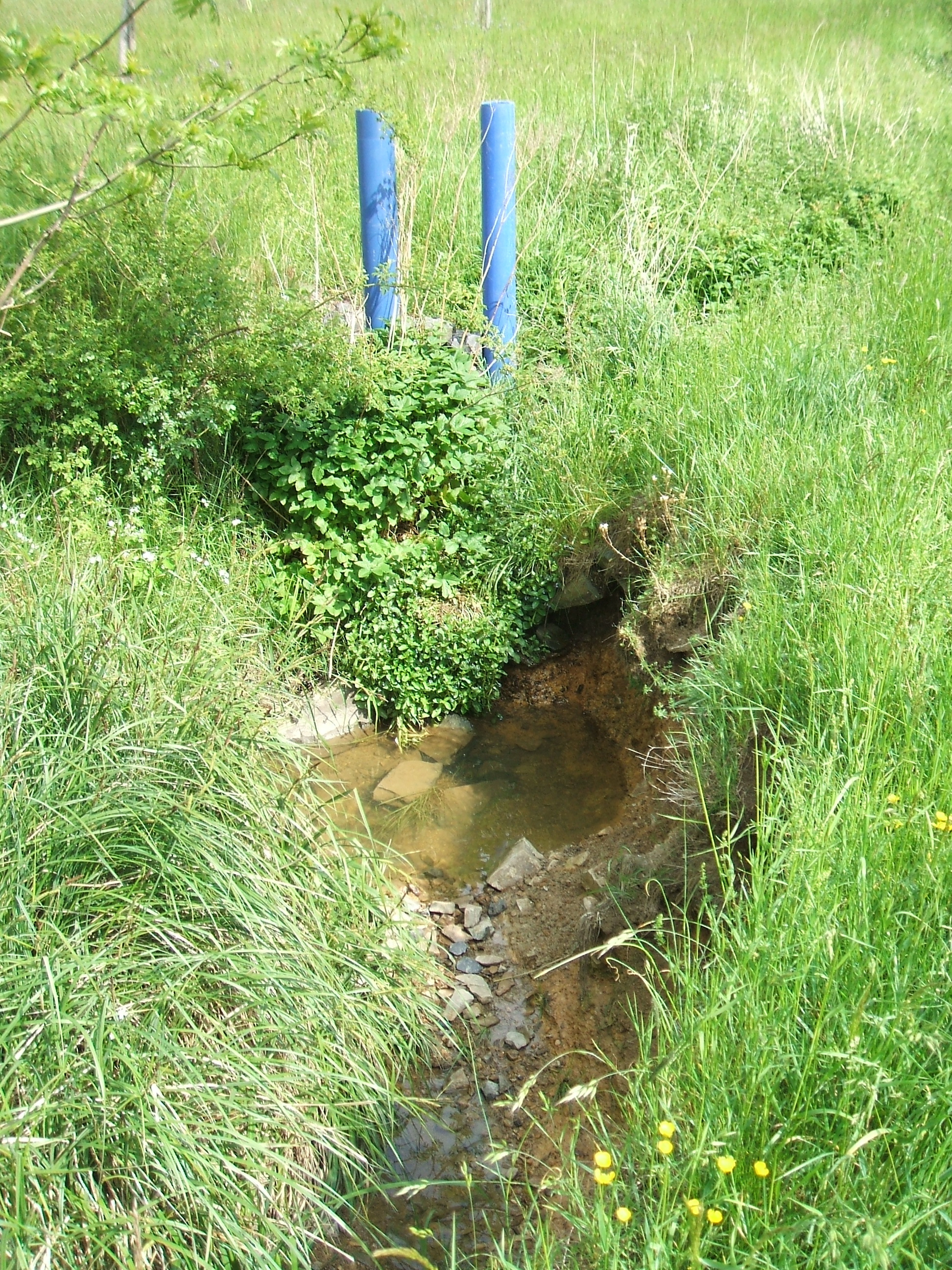 Lauf des Hainbachs am Kolk mit den blauen Plastikrohren